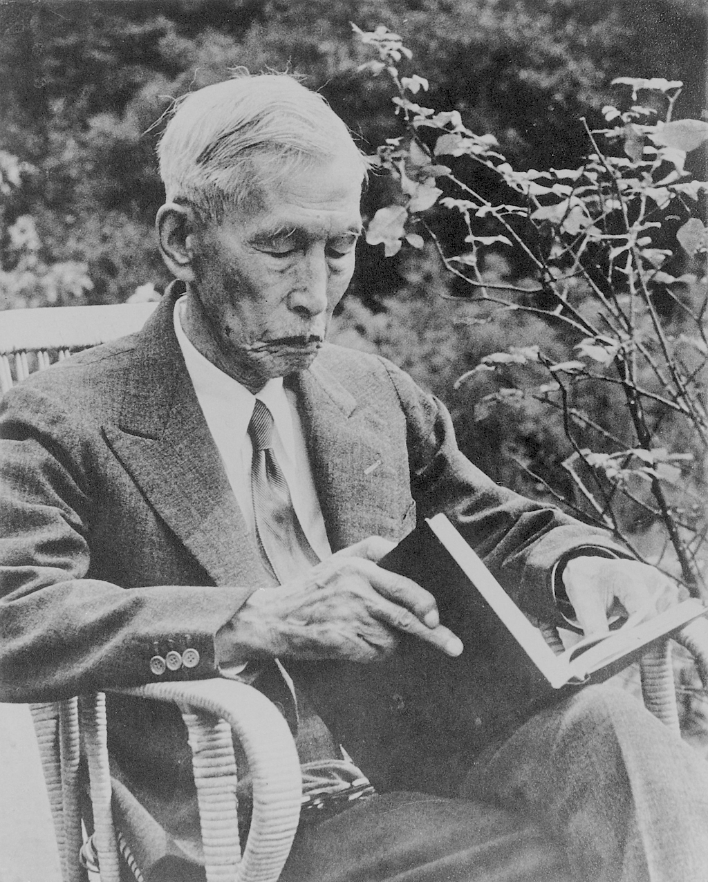 Portrait of Kabayama Aisuke (樺山愛輔, 1865 – 1953)